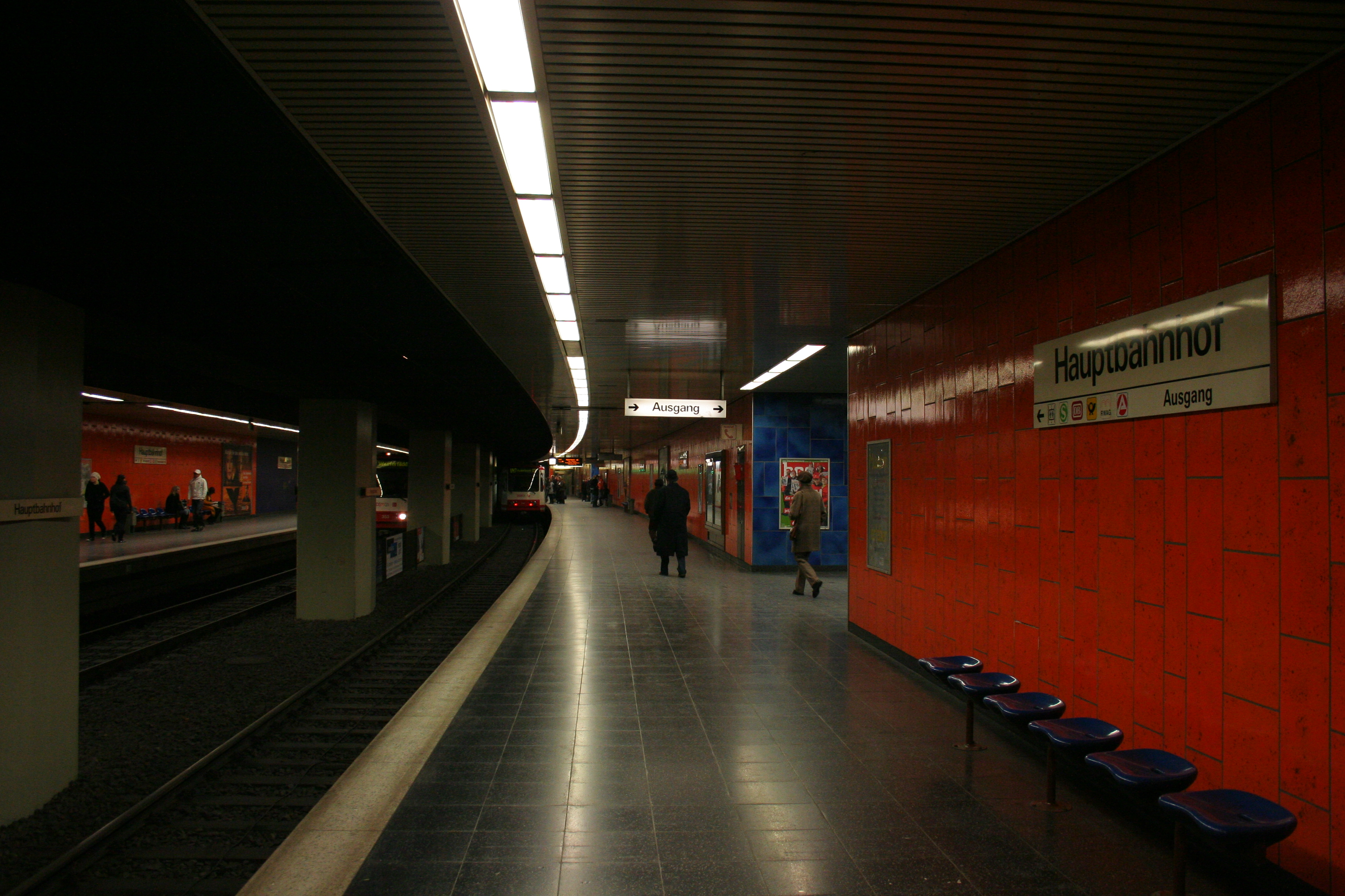 U-Bahnhof Dortmund Hbf der Stadtbahn Dortmund